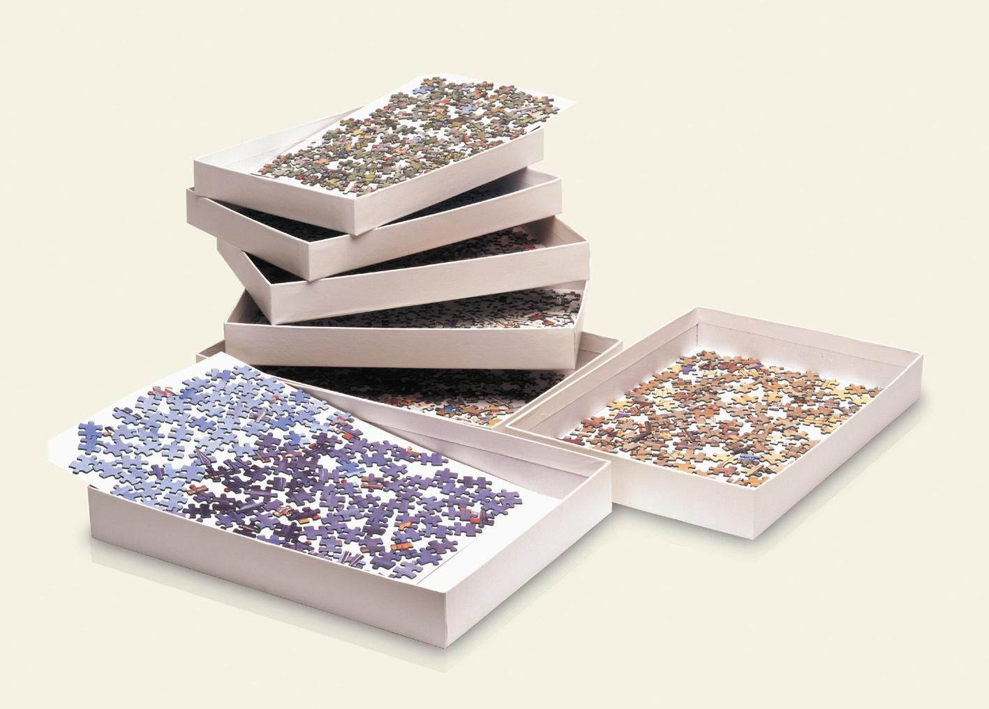 Jigsafe